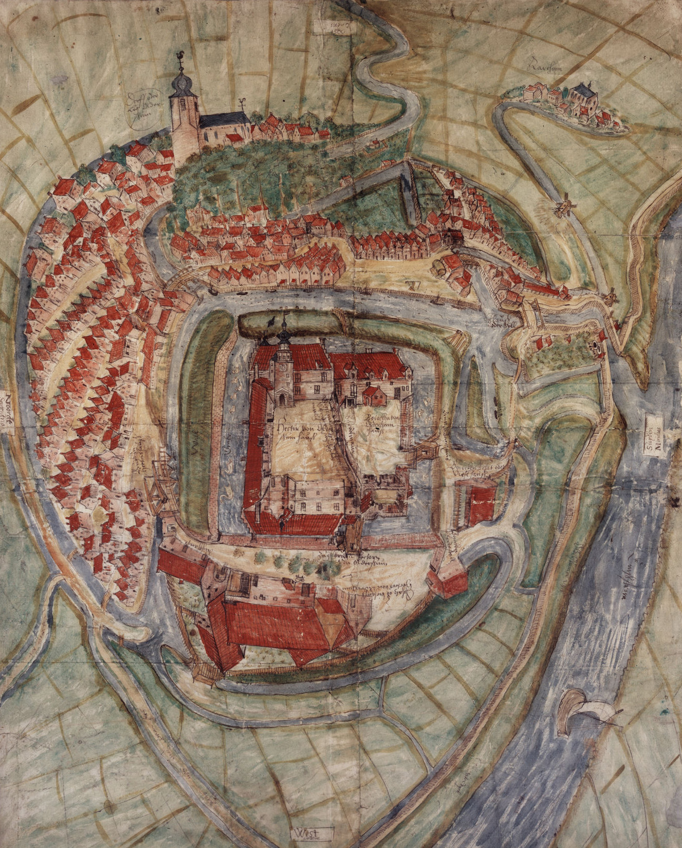 Karte der Burg Oldersum (1585) (Staatsarchiv Aurich, Rep. 244 B 3892).